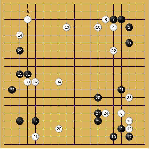 第4期名人戦挑戦手合七番勝負第6局 1965年8月19-20日 坂田栄男名人-林海峰(先番) 1-34手